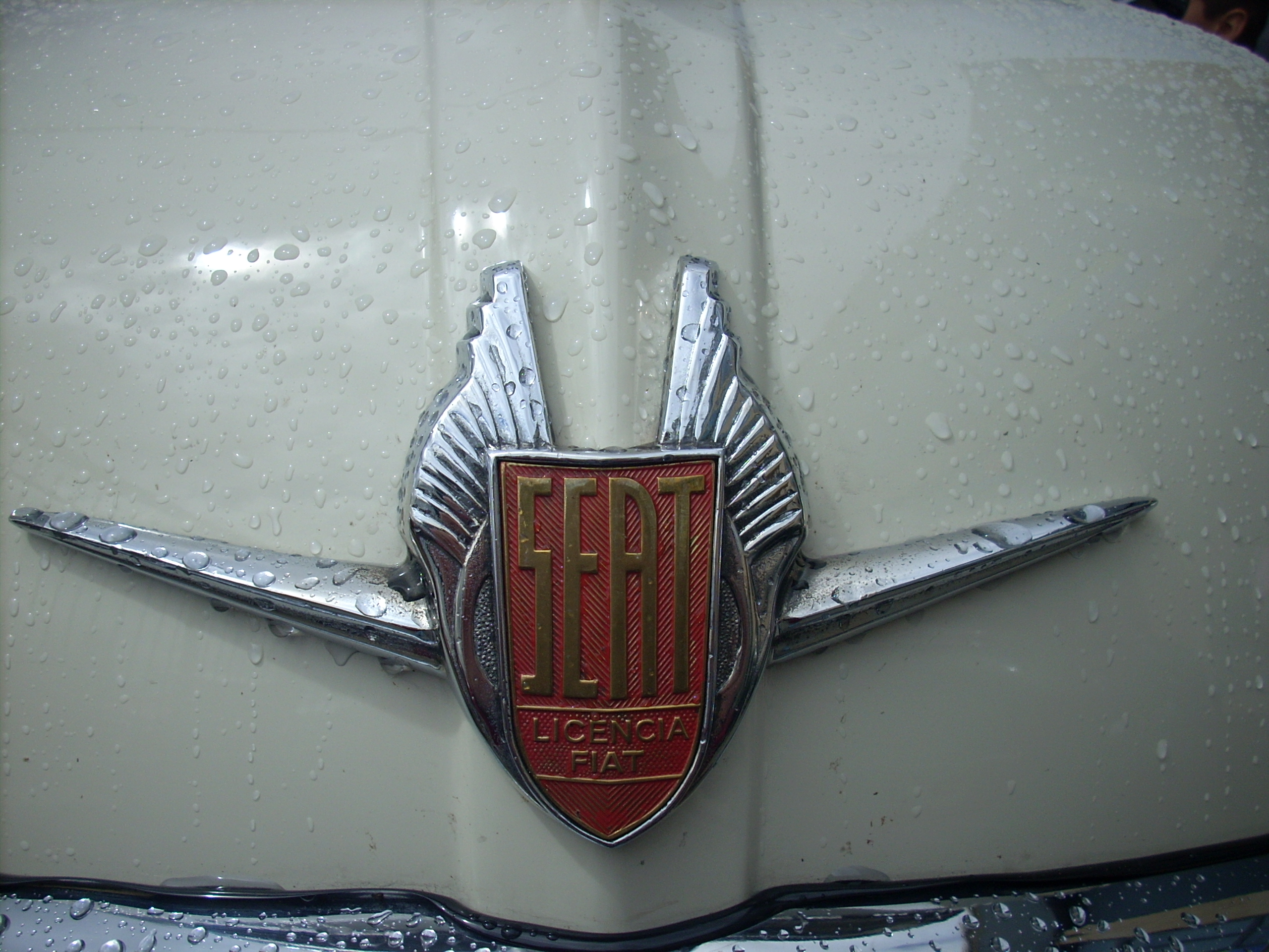 Primer emblema de la marca SEAT.